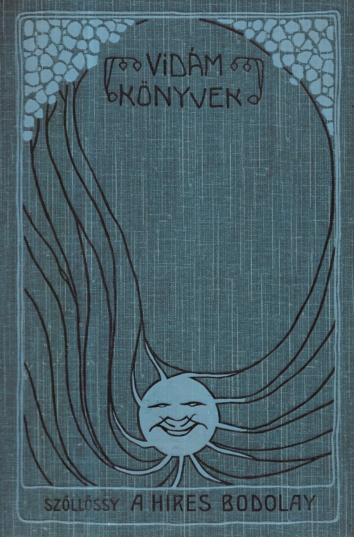 A "Vidám könyvek" című könyvsorozat borítódísze (Szöllősy: A híres Bodolai, 1905)